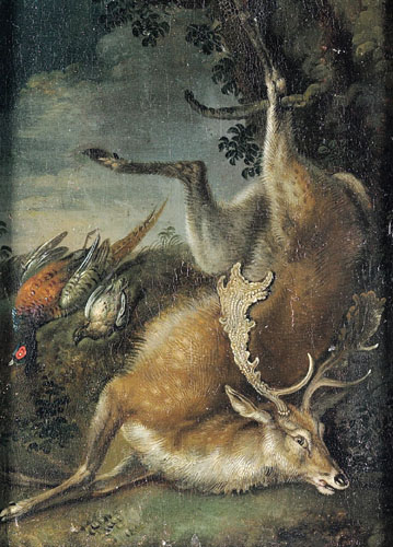 Waldszene